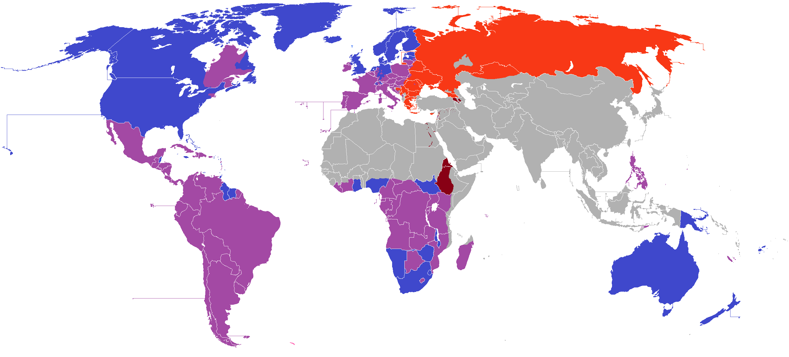 Países y regiones donde es mayoritario el catolicismo Países y regiones donde es mayoritario el protestantismo Países y regiones donde es mayoritario el chistianismo ortodoxo Países y regiones donde son mayoritarias las iglesias cristianas primitivas